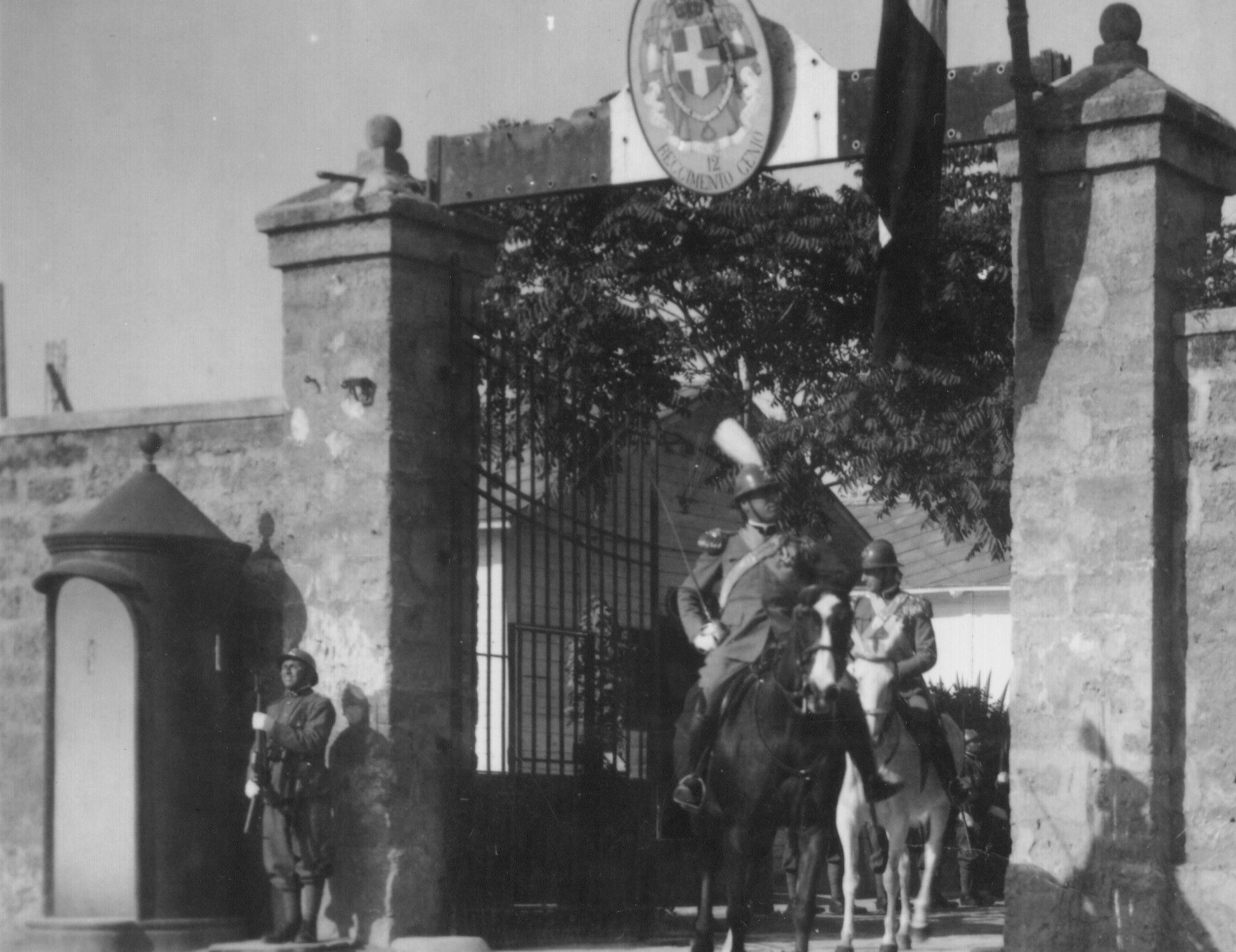 Caserma del 12° Reggimento Genio Palermo. Foto dell'archivio privato della famiglia Riggio.